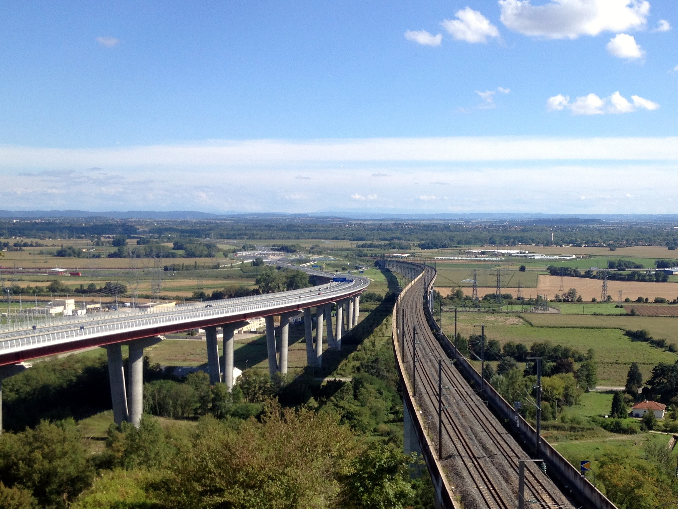 Les deux viaducs de la Côtière.